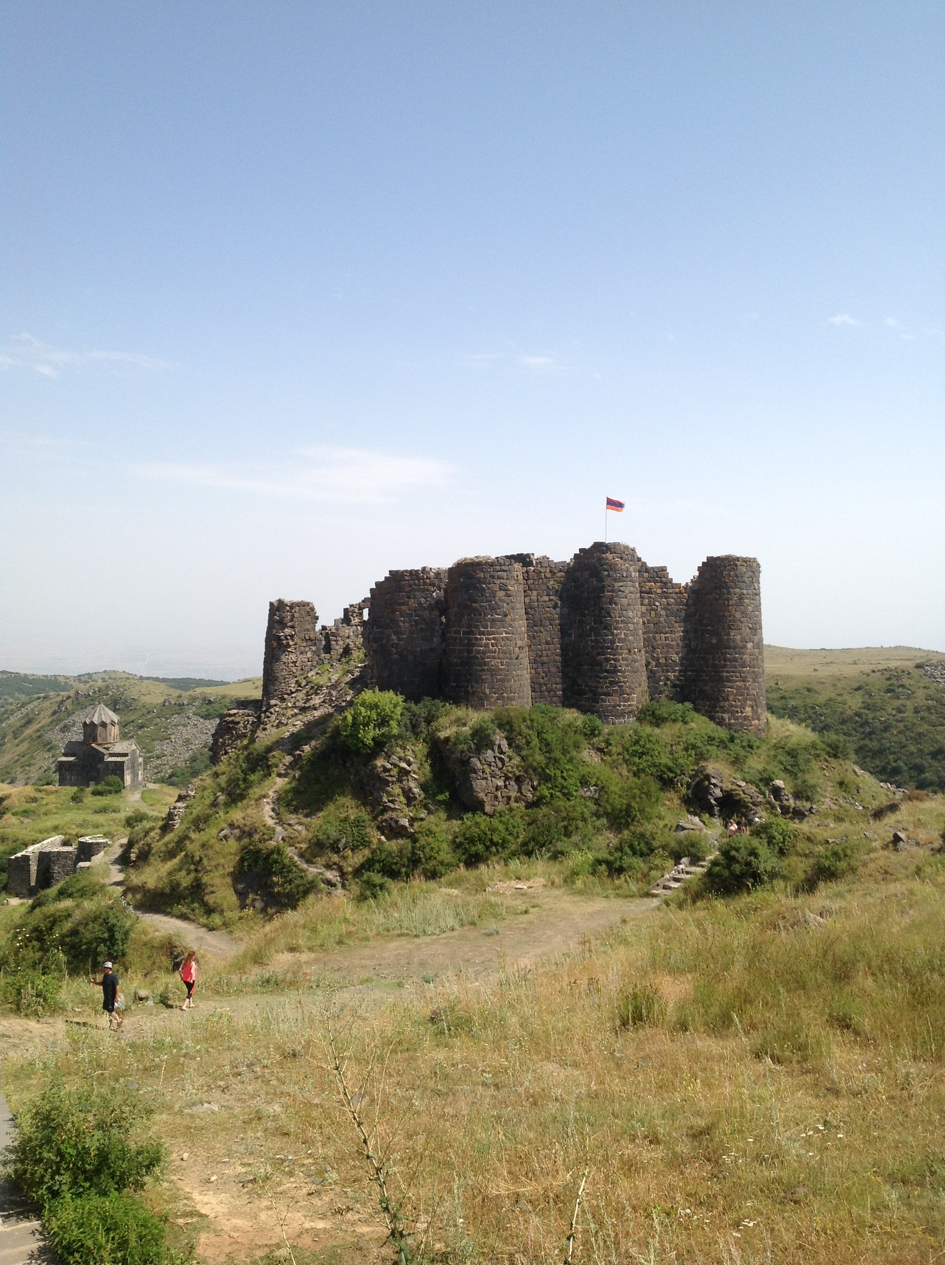 Ամբերդի ամրոցը և Սուրբ Աստվածածին եկեղեցին: 28/5